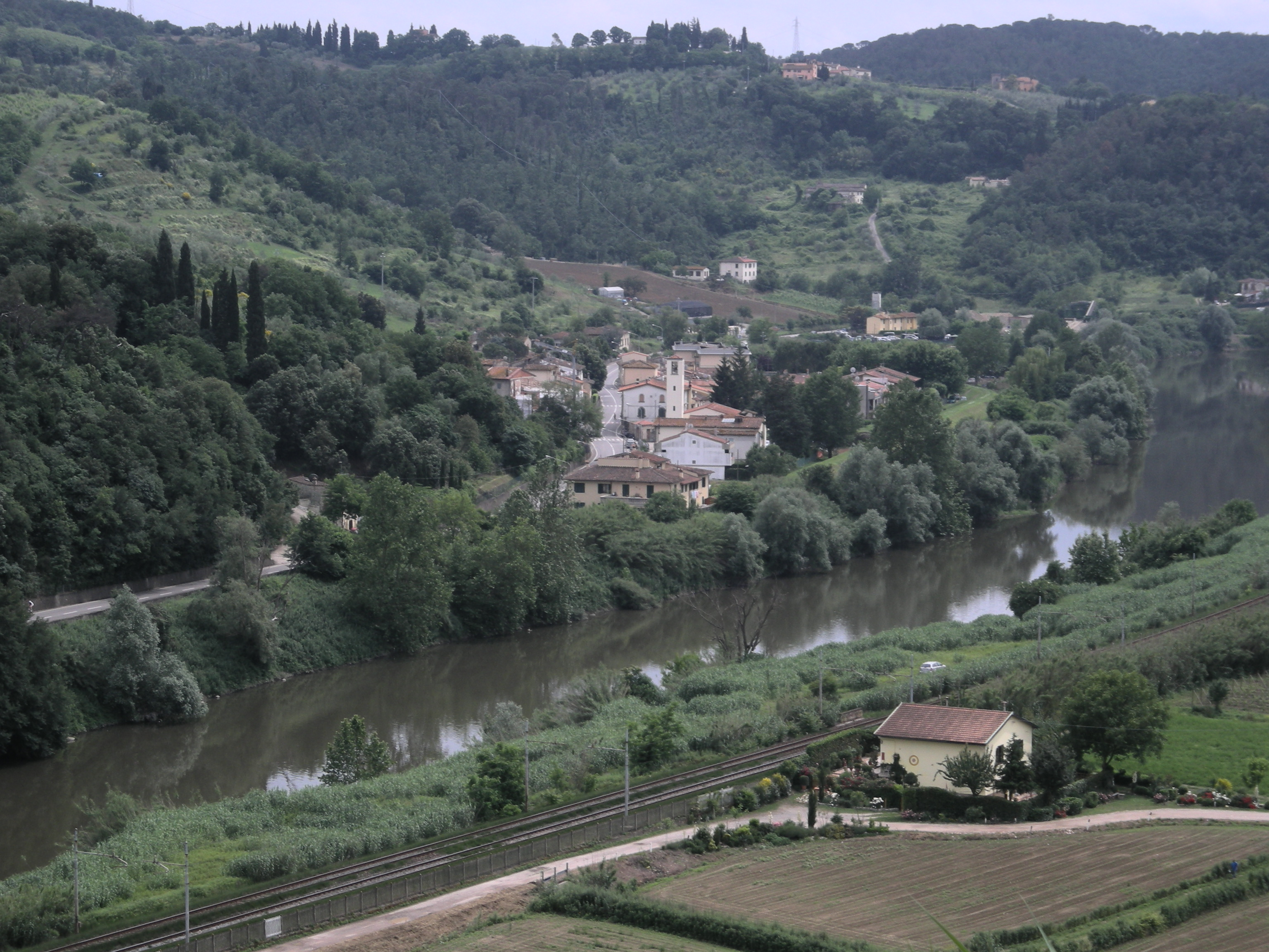 Brucianesi visto da Poggio alla Malva.